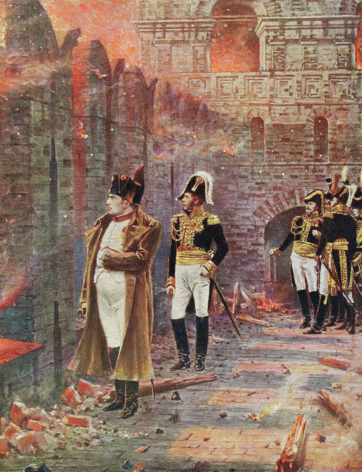 В. В. Верещагин. «В Кремле — пожар!». 1887—1898.